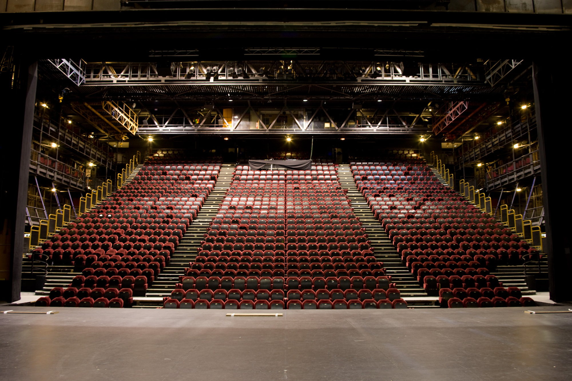 La salle Jean Vilar du Théâtre National de Chaillot (1250 places)